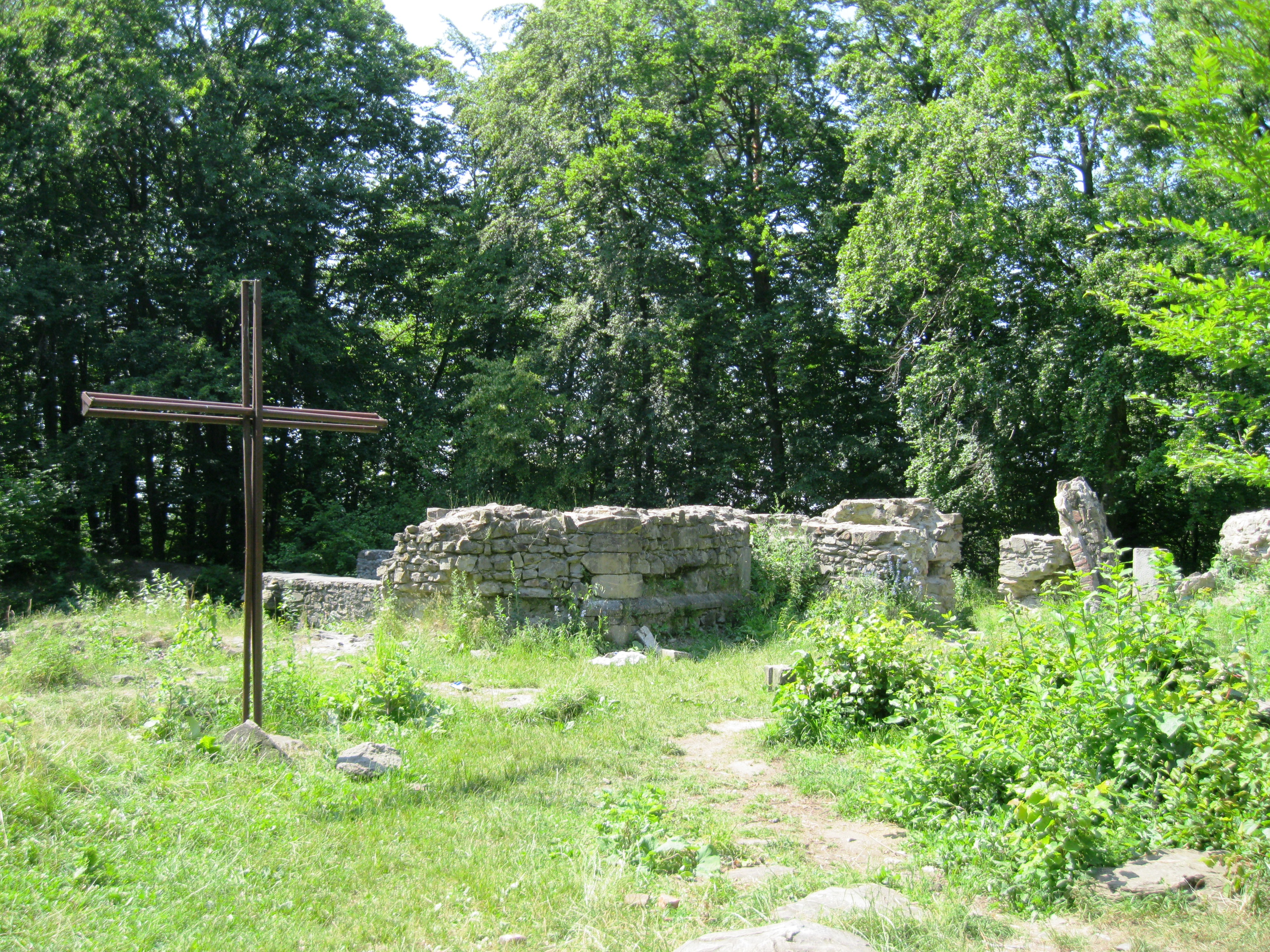 Klášter kartouzský Vallis Josaphat, zřícenina (Dolany), SV od obce, nad levým břehem Dolanského potoka, Dolany